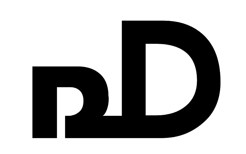 ഫ മലയാളം അക്ഷരം